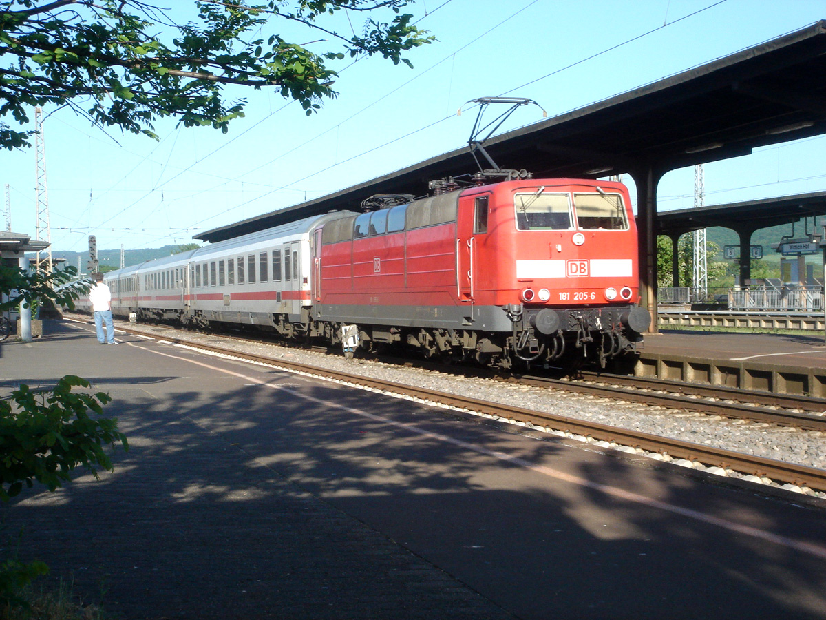 181205 mit InterCity 432 nach Luxemburg in Wittlich Hbf